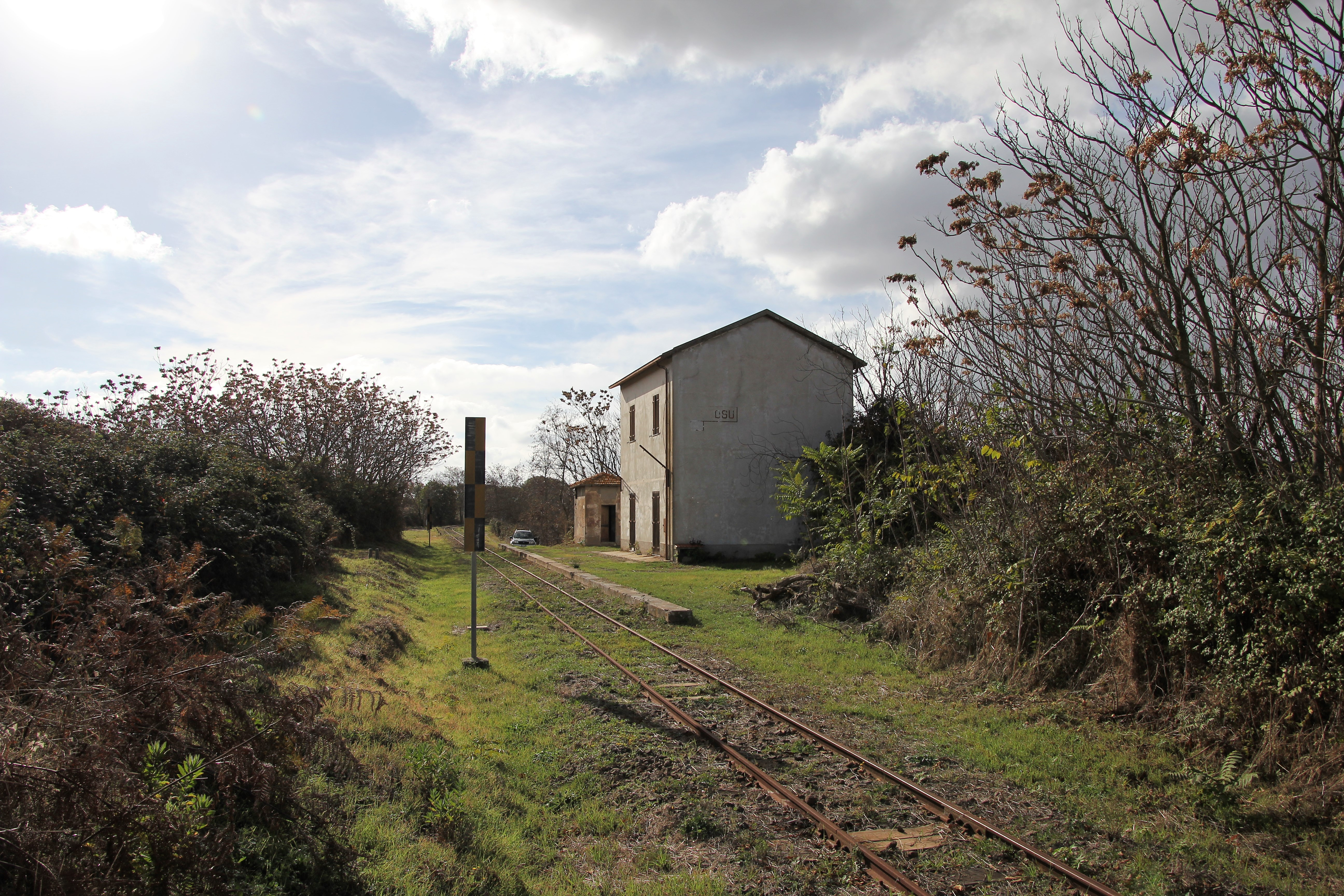 Ploaghe, stazione ferroviaria di Fenosu